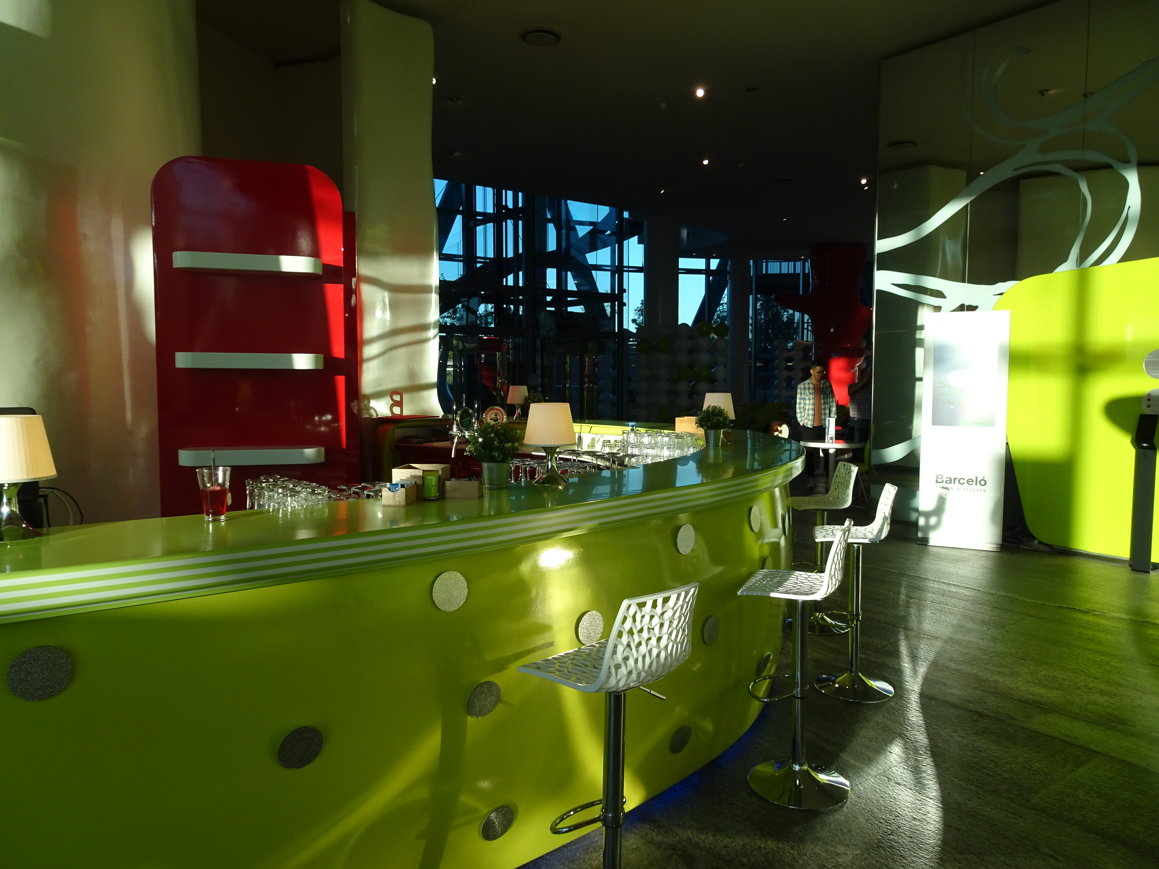 Équipements in Hotel Barceló Milano Italy